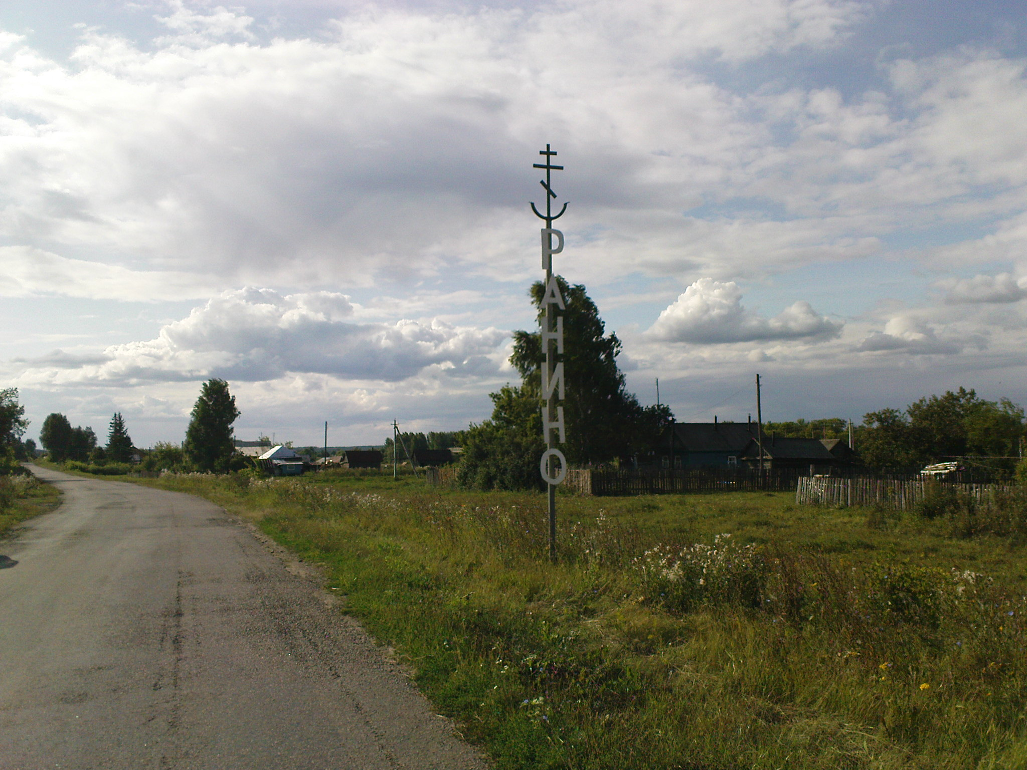 Фото въезда в село Ранино со стороны г. Мичуринска